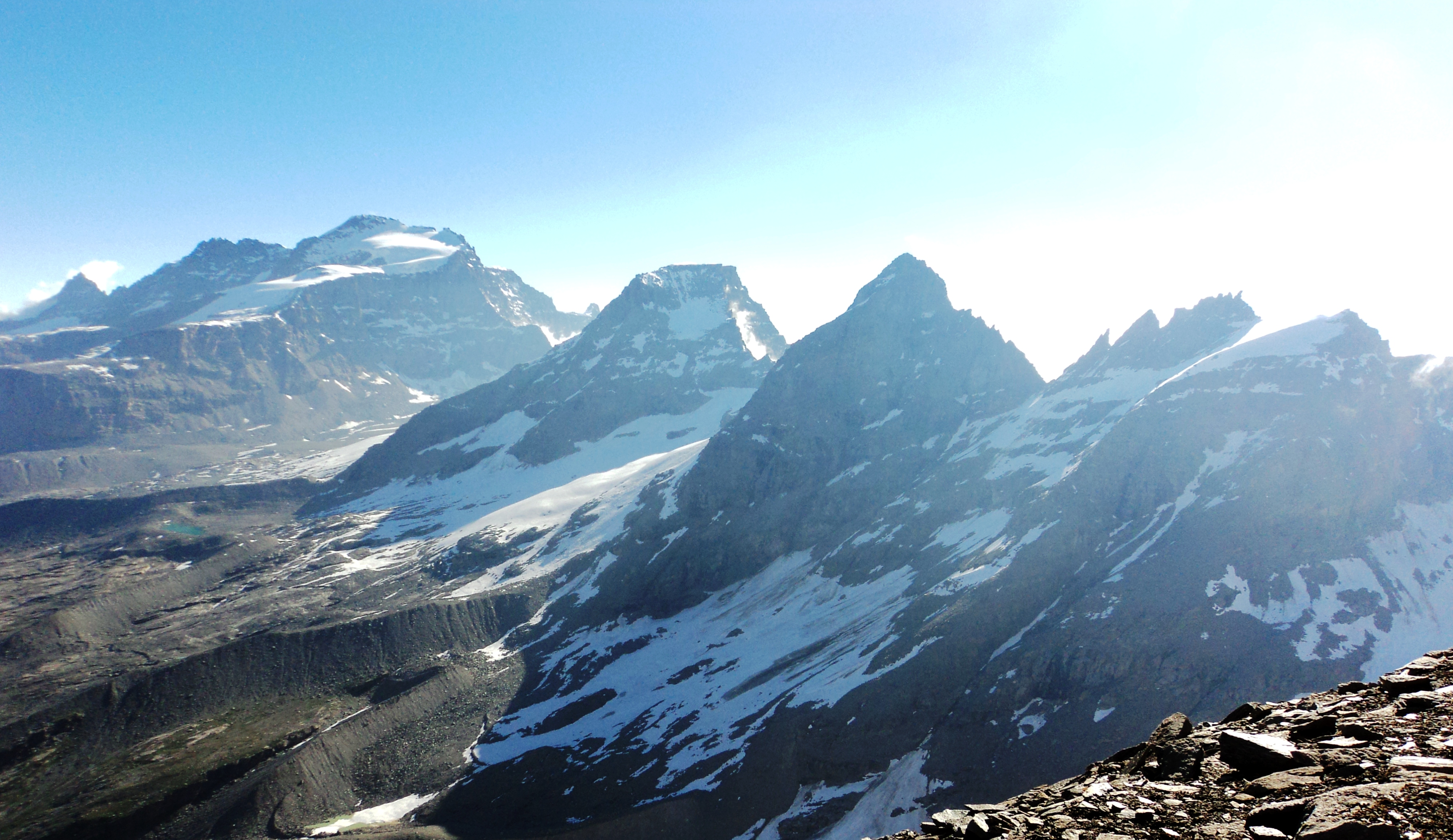 Il Gran Paradiso, il Ciarforon, la Becca di Monciair ed i Denti del Broglio visti dalla Punta Fourà